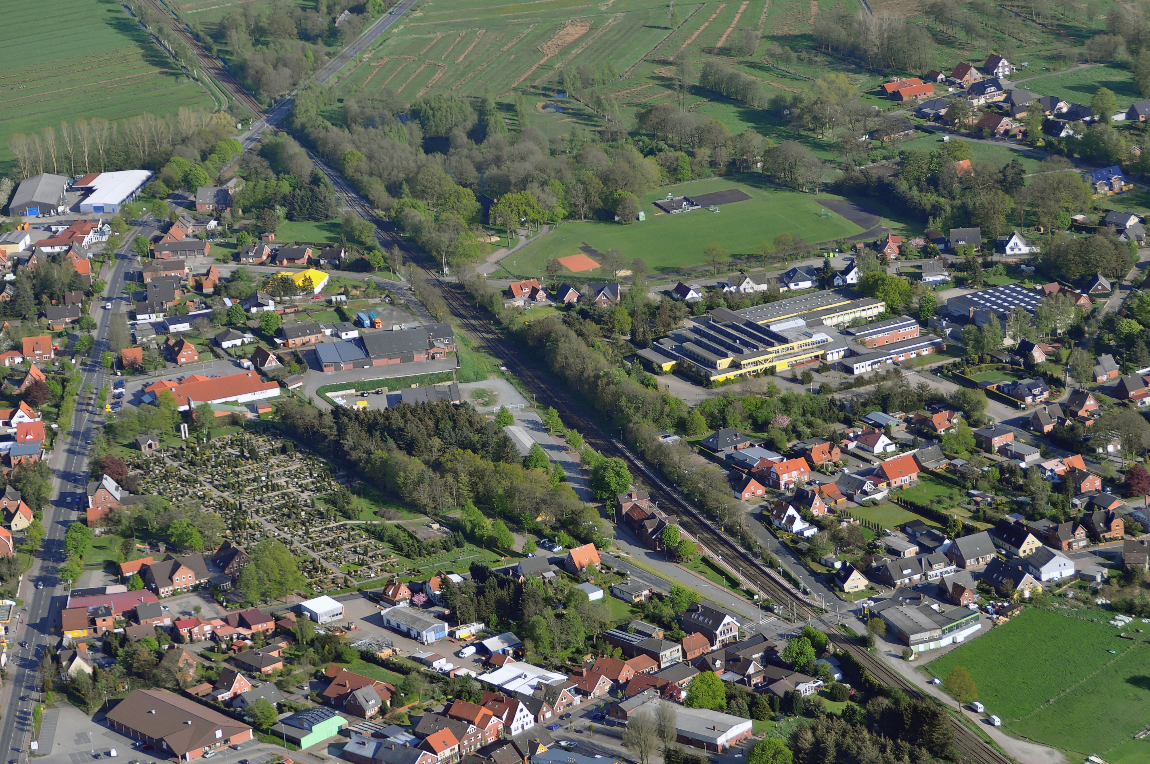 Luftbilder von der Nordseeküste 2012-05